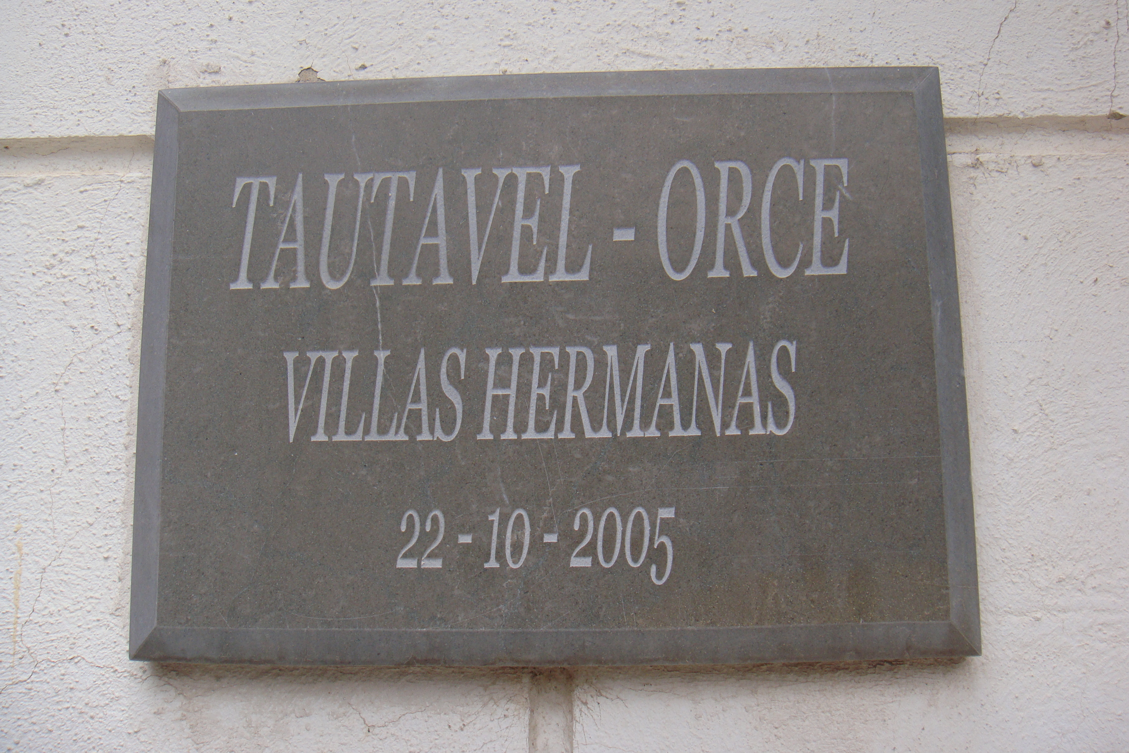 Localidad de Orce